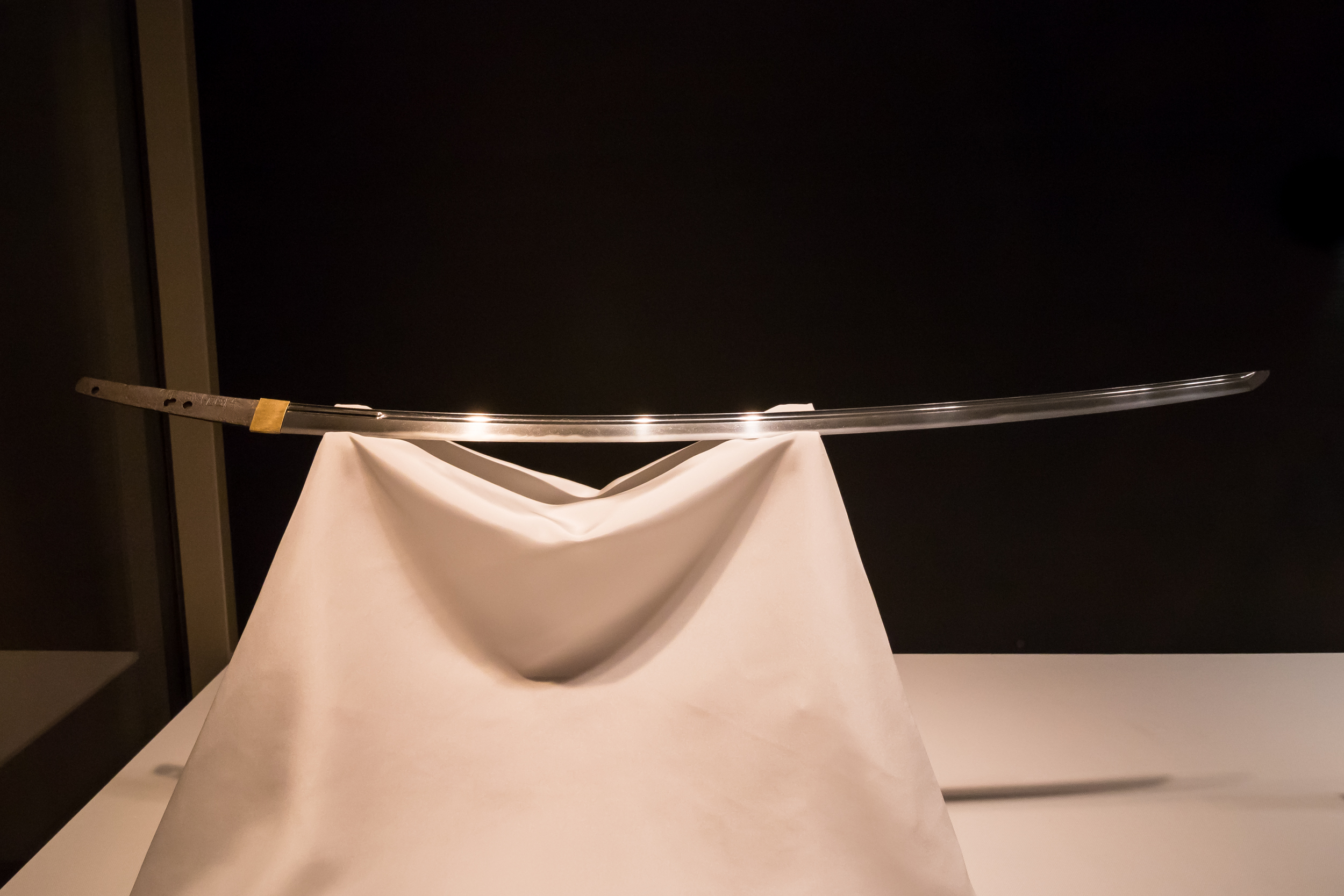 太刀 - 「銘 備前国友成造」古備前友成（国宝）、平安時代・11-12世紀。